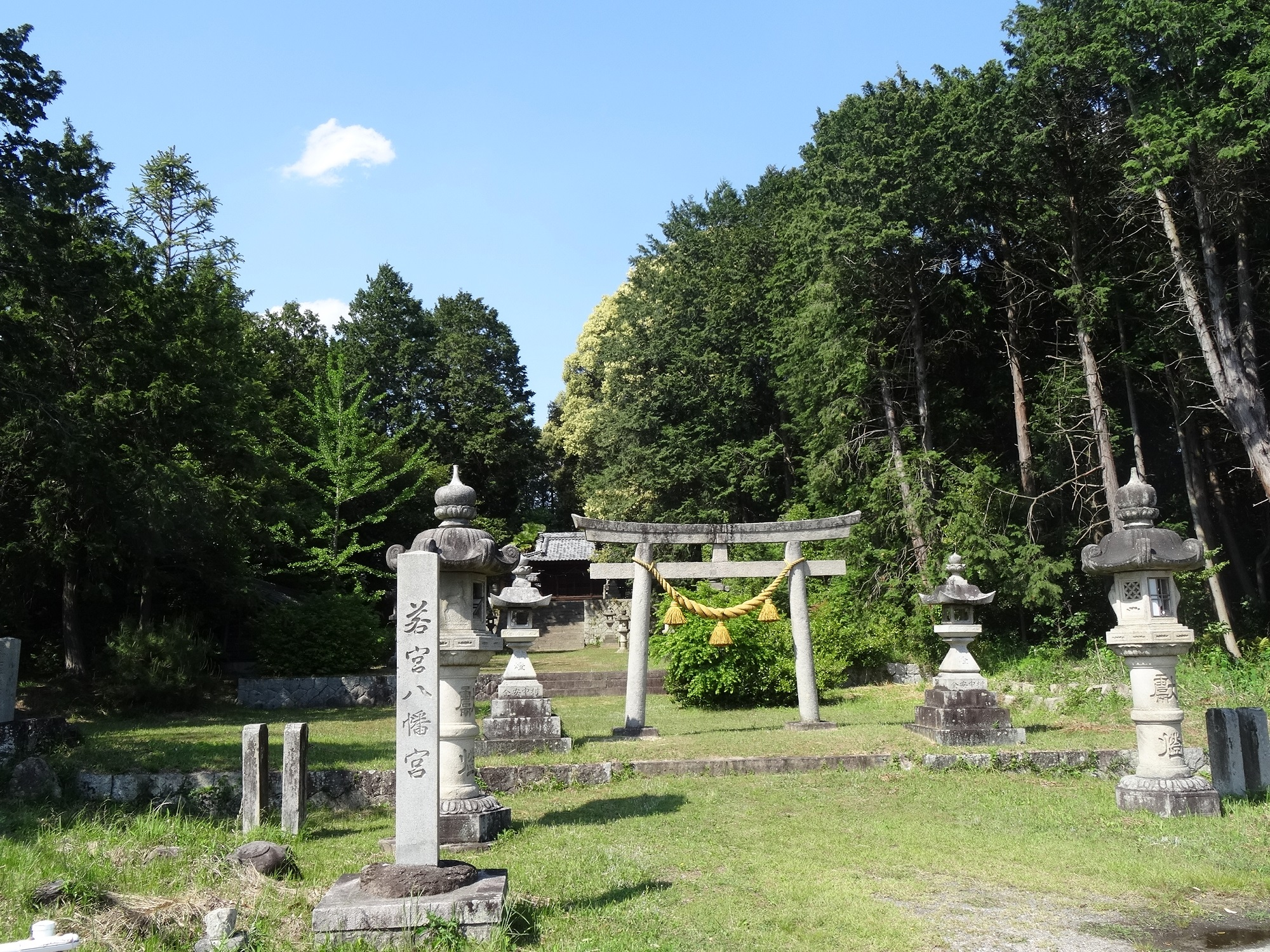 若宮八幡宮（岡崎市西阿知和町）